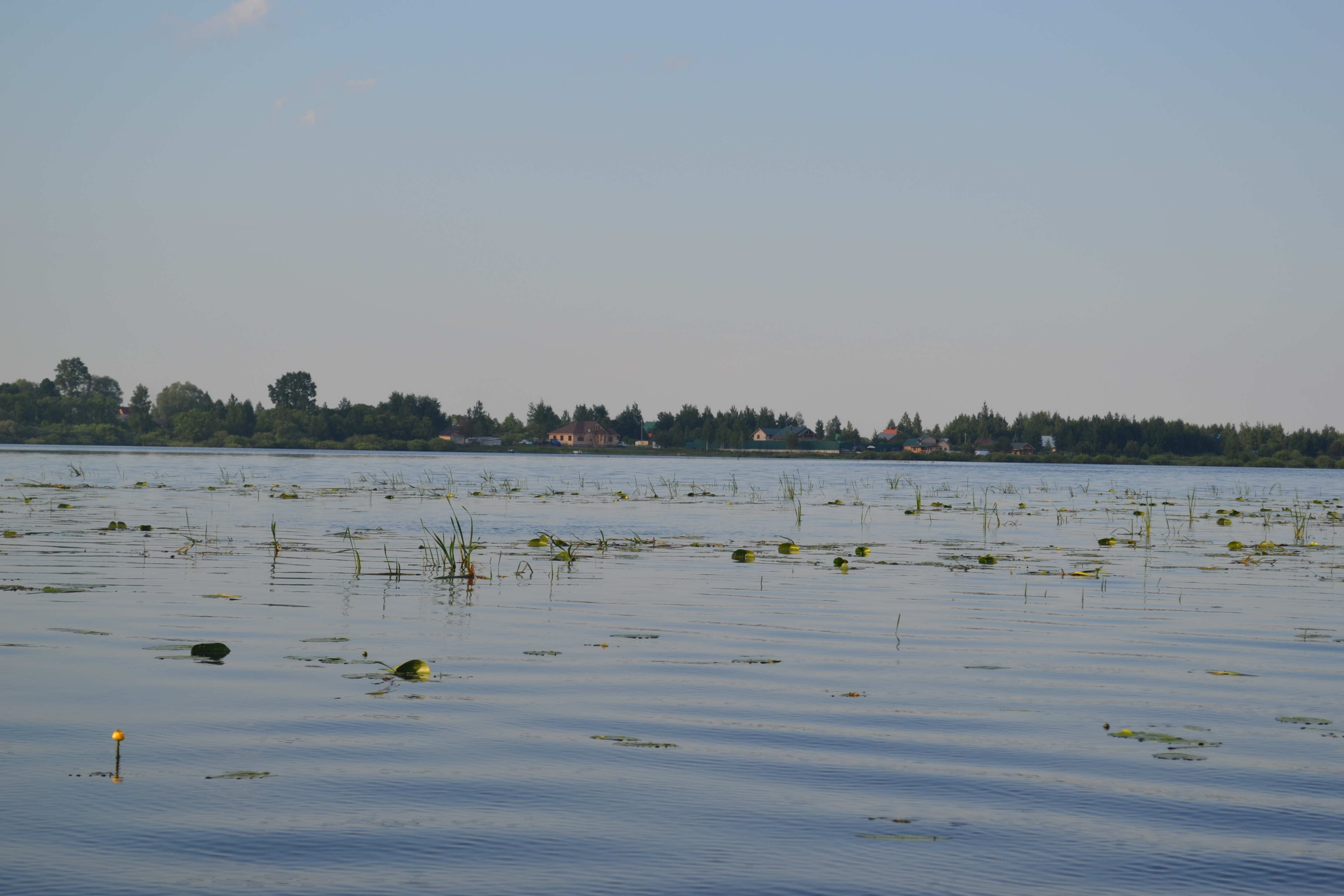 Филисово (Шатурский район)